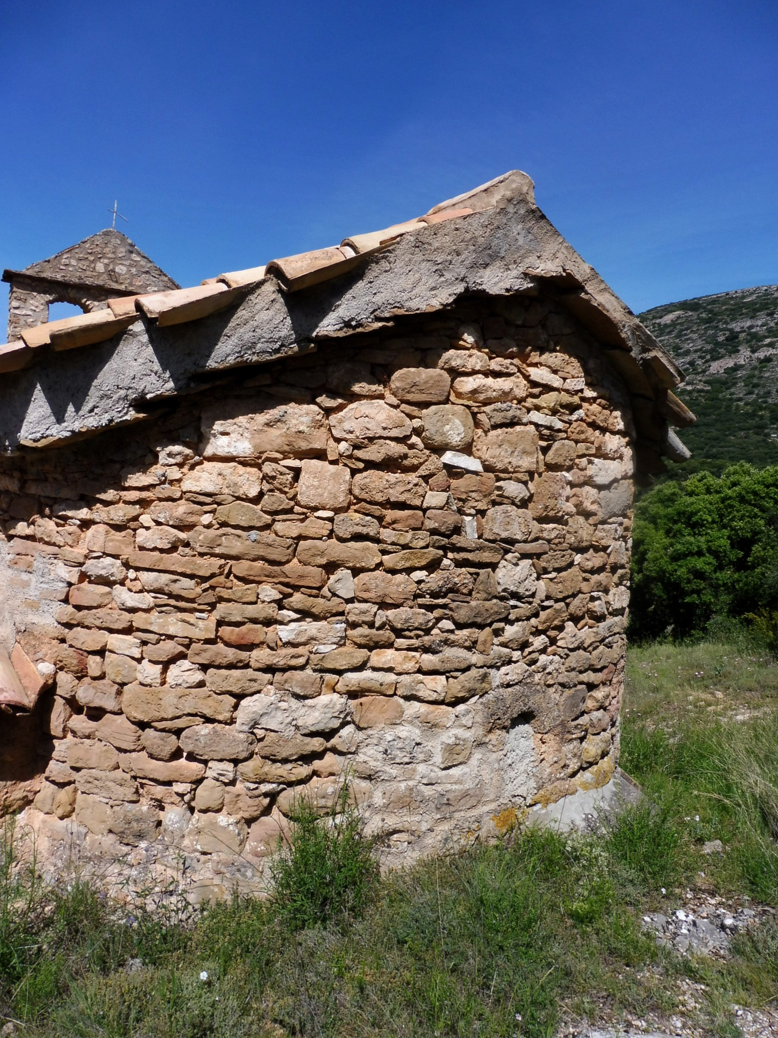 Església parroquial de Sant Martí de Cortiuda (Peramola): absis